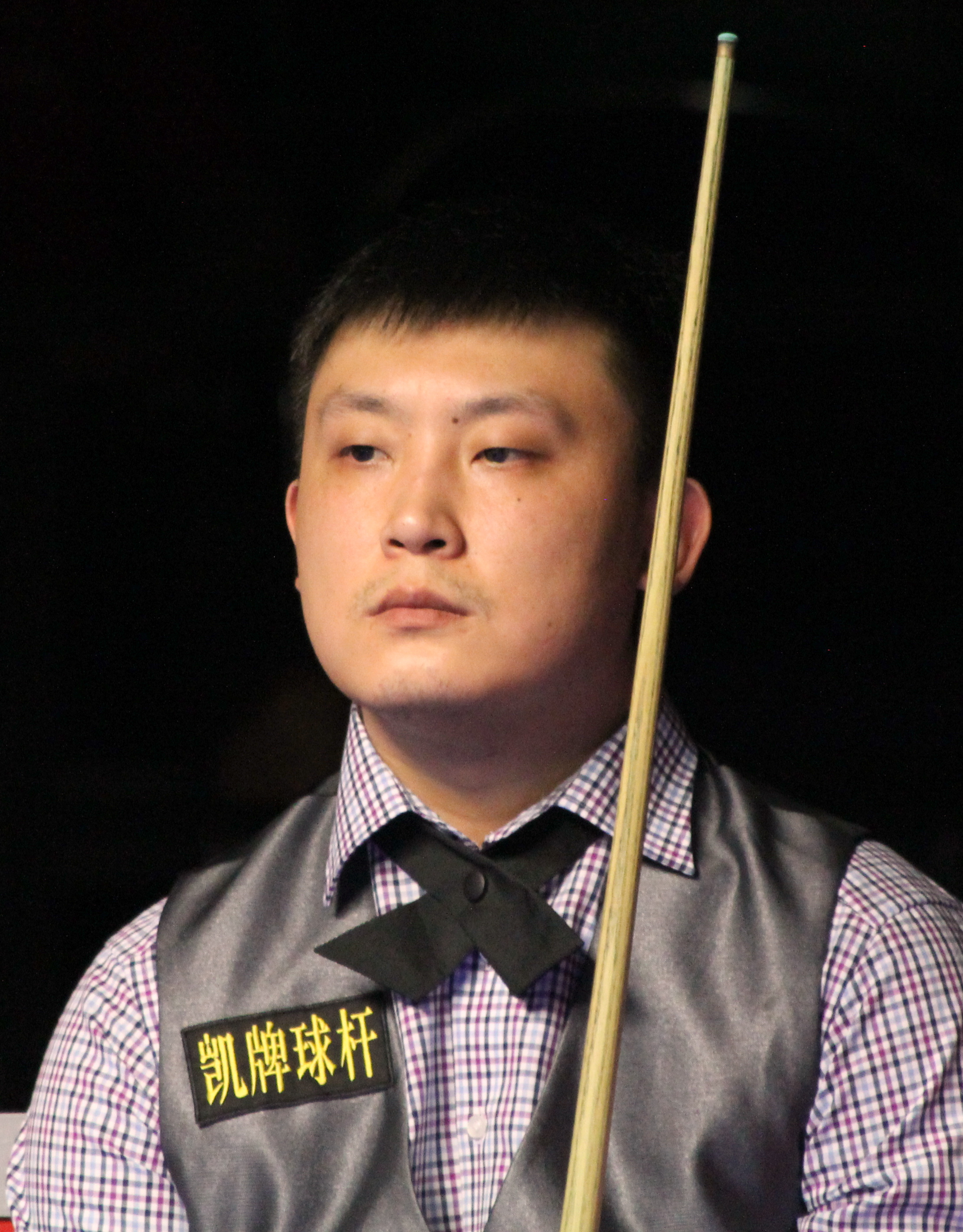 Yu Delu beim Paul Hunter Classic 2016